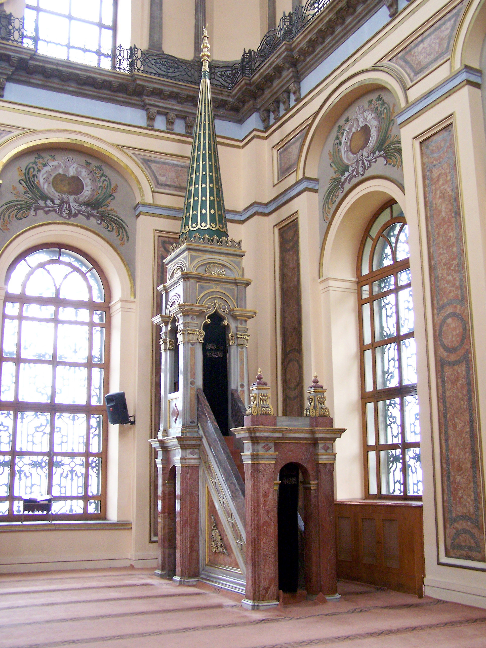 Minbar of Bezm-i Alem Valide Sultan Camii (Dolmabahçe Camii) in Beşiktaş, İstanbul, Turkey